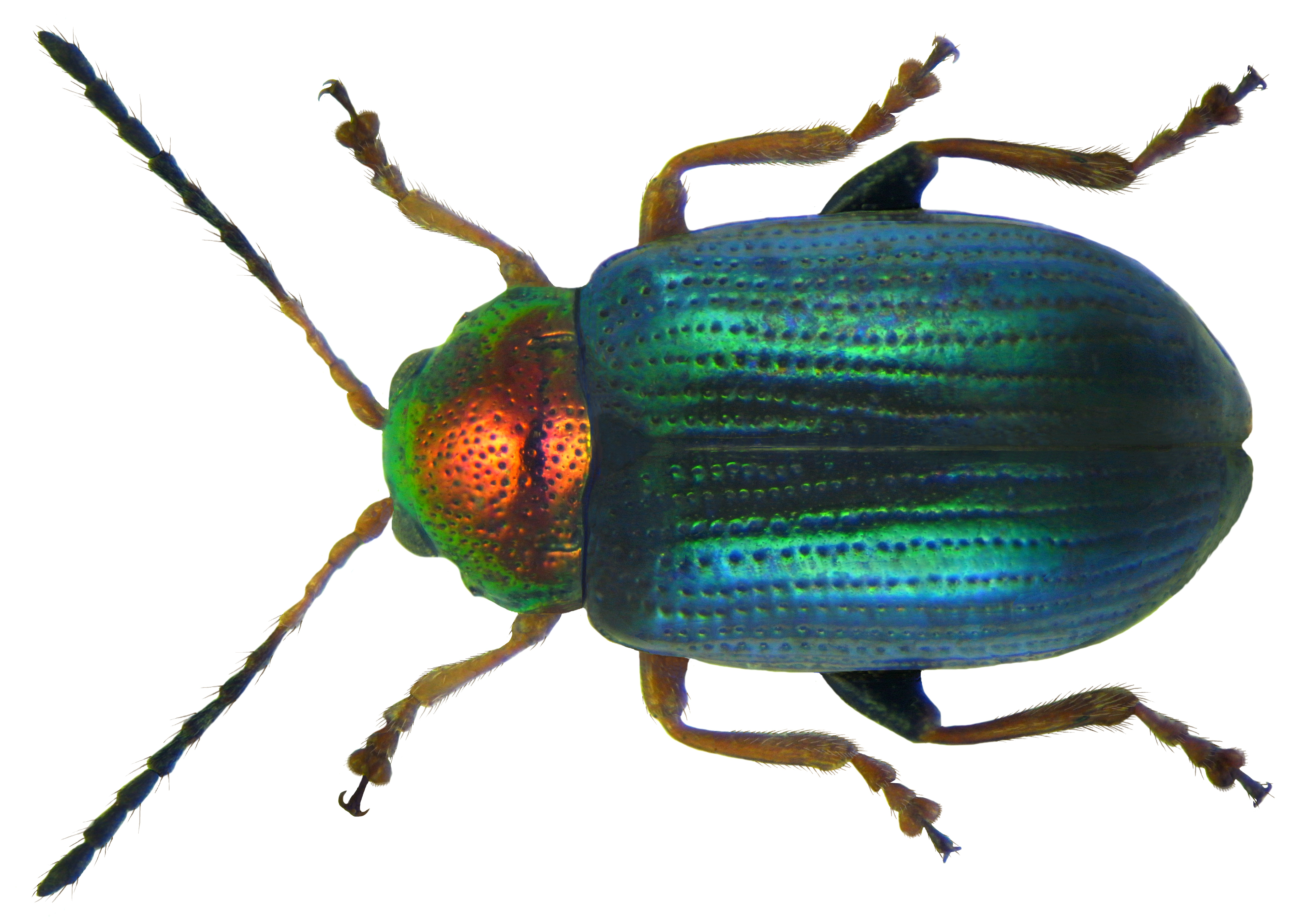 Crepidodera aurata (Marsham, 1802) Familie: Chrysomelidae Groesse: 2,5-3,5 mm Verbreitung: Europa Oekologie: an Salix-und Populus-Arten Fundort: Germania, Bayern, Oberfranken, Selbitz leg.det. U.Schmidt16.VI.2004 Photo: U.Schmidt, 2011